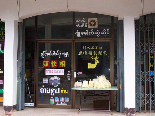 Devanture d'un magazin avec inscriptions (Birman)